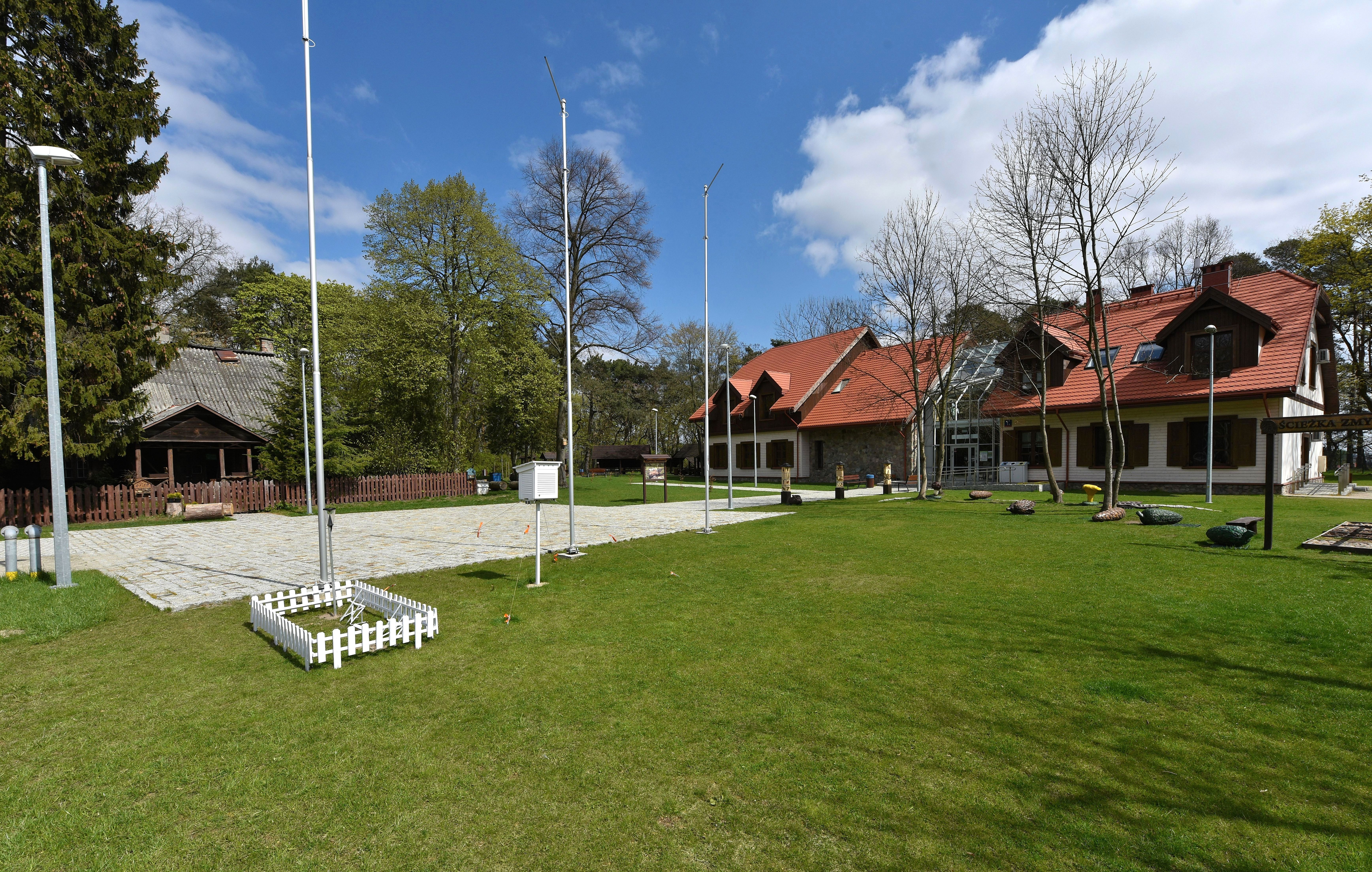 Centrum Edukacji Przyrodniczo-Leśniej Lasów Miejskich w Warszawie przy ul. Rydzowej 1a, na skraju rezerwatu przyrody Las Kabacki im. Stefana Starzyńskiego